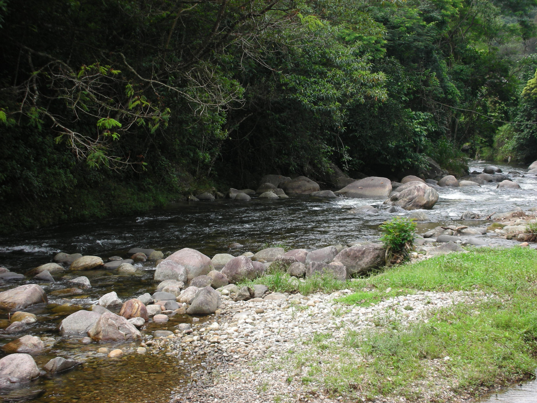 Trecho do Rio Macacu, em Boca do Mato, Município de Cachoeiras de macacu, Estado do Rio de Janeiro, Brasil.